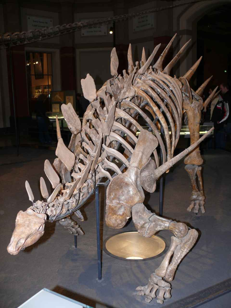 Kentrosaurus aethiopicus, Berliner Naturkundemuseum